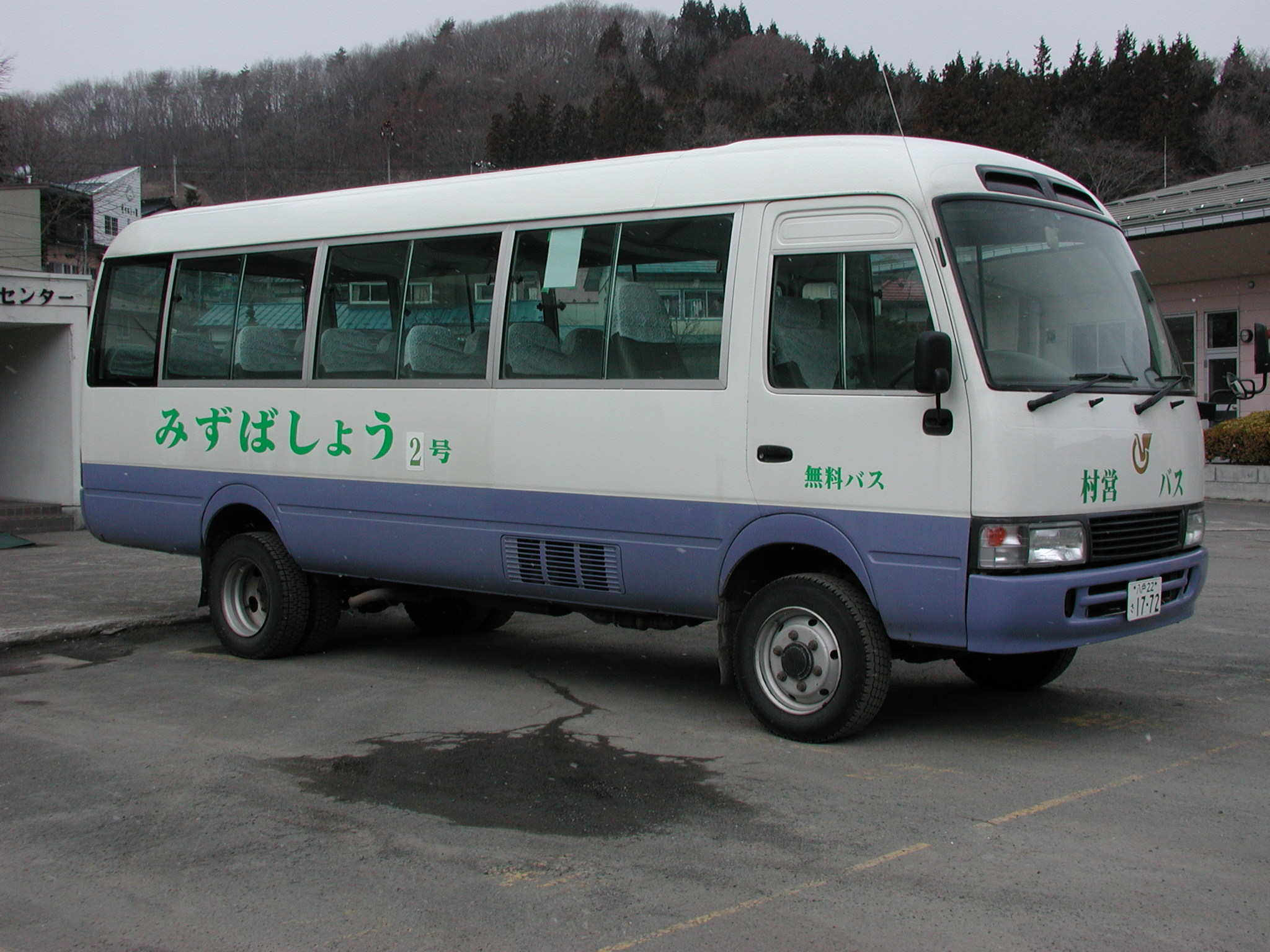 新郷村営バス車両（みずばしょう2号車） - トヨタ・コースター 新郷村役場にて